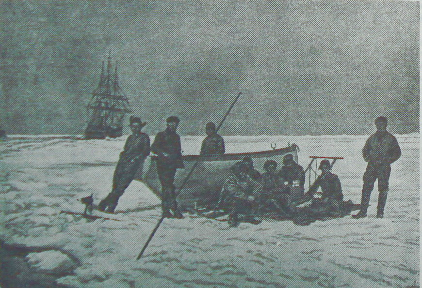 Expediția lui Emil Racoviță la Polul Sud - Moment de răgaz în timpul săpării canalului prin care Belgica a ieșit din banchiză (Foto: Fr. Cook). Cook și-a intitulat fotografia "Ceaiul de la ora 5"